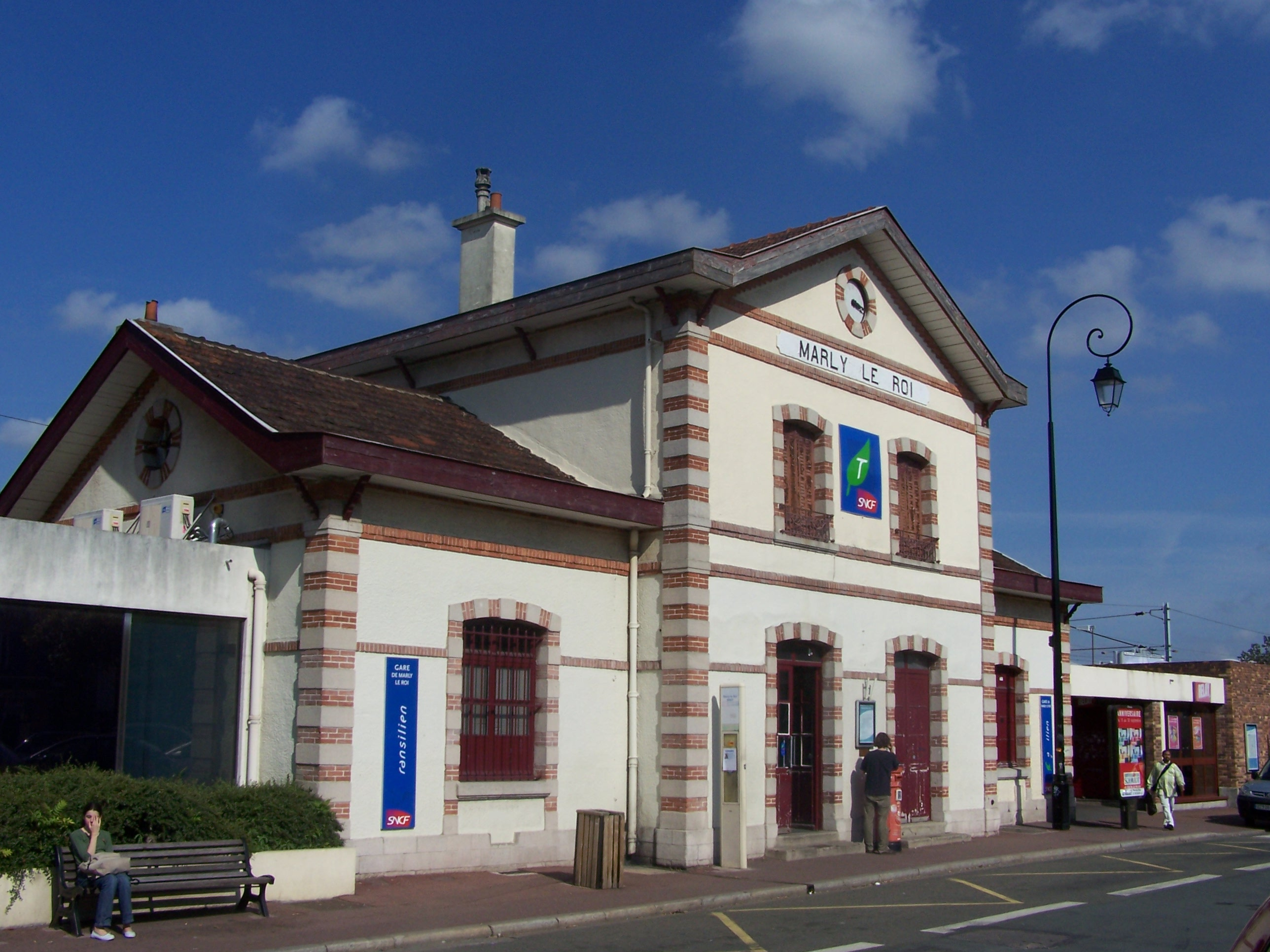 Gare de Marly-le-Roi (Yvelines, France)